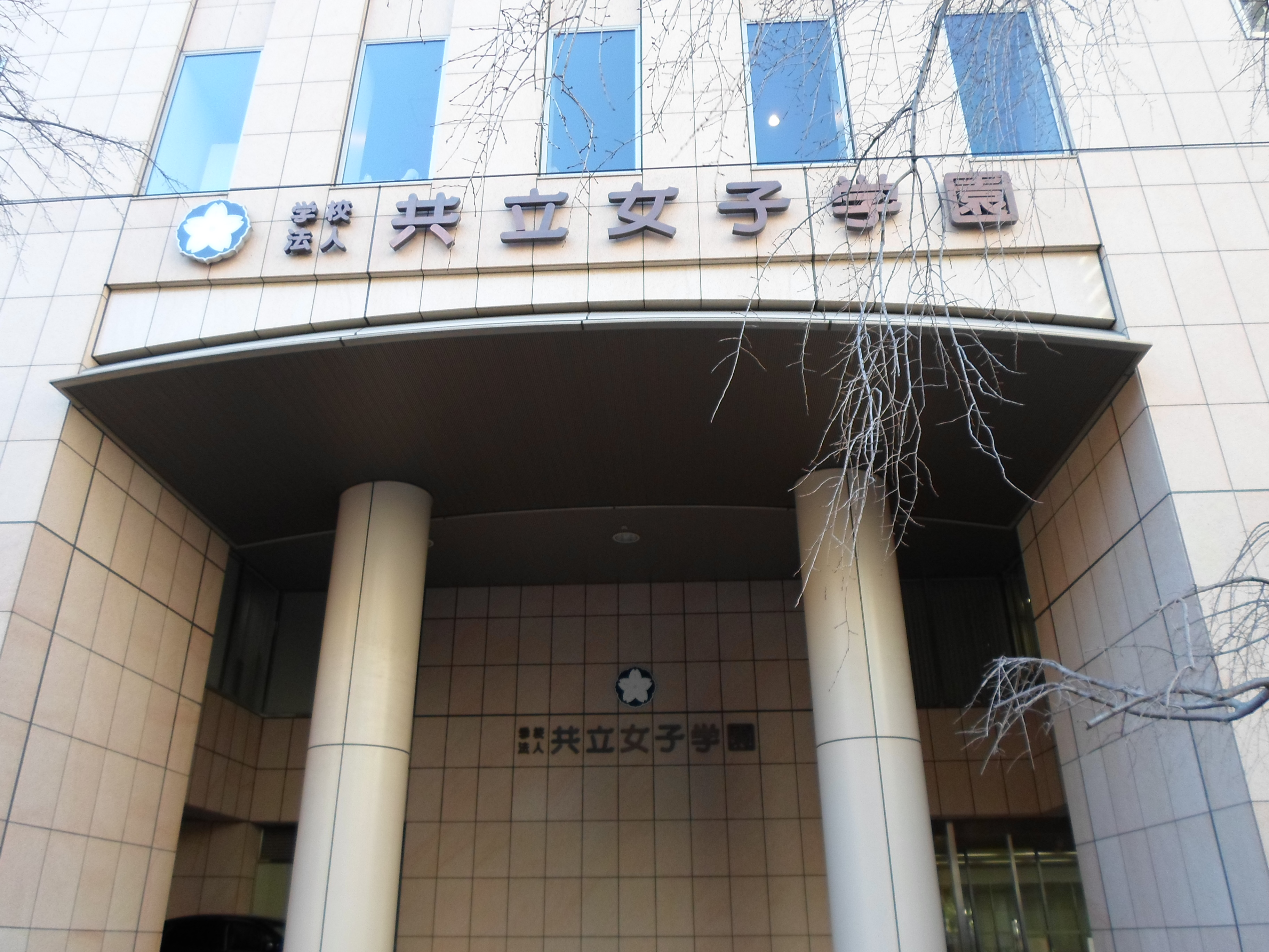 共立女子学園、東京神田神保町